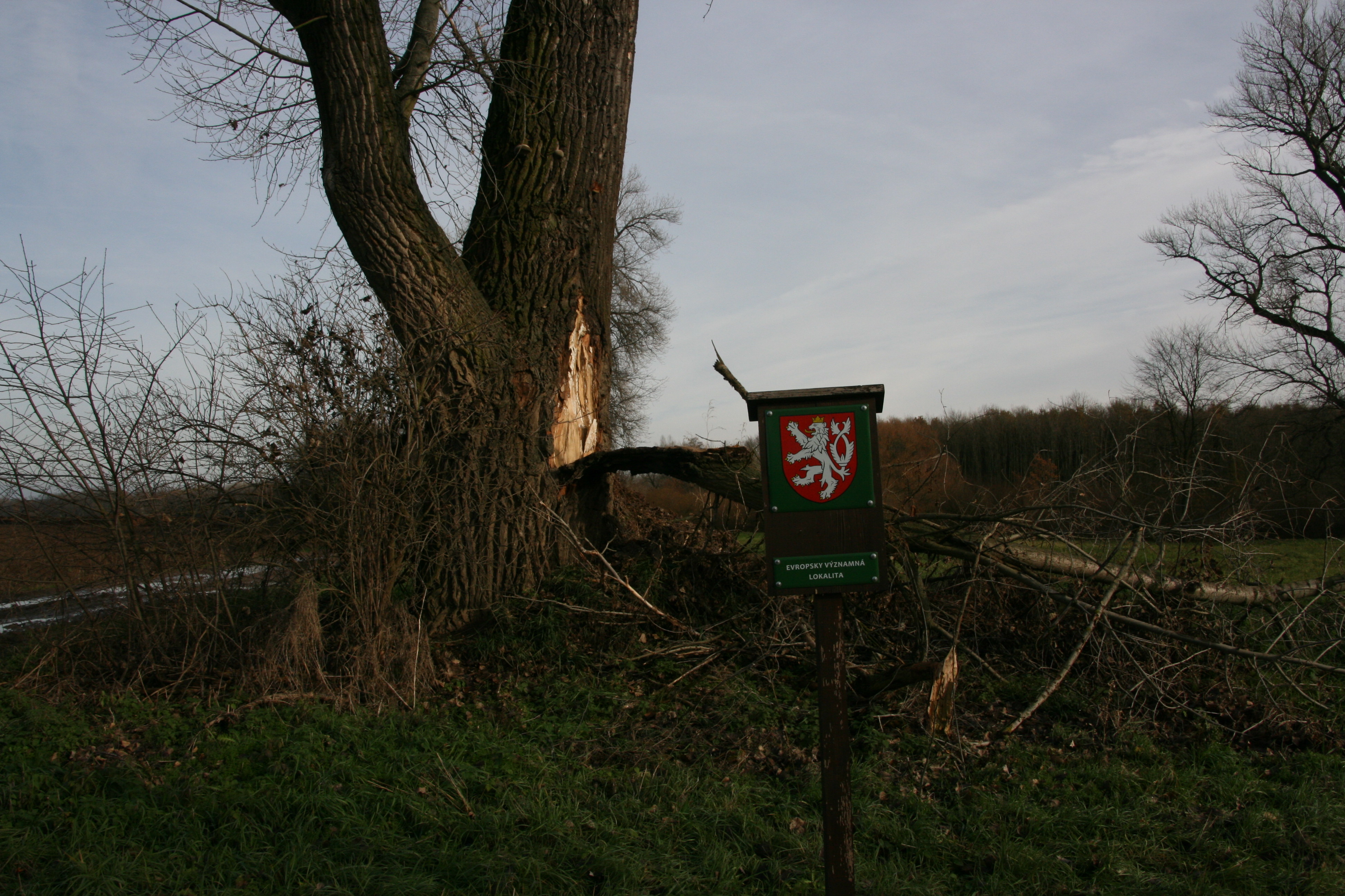 EVL u starého Labe